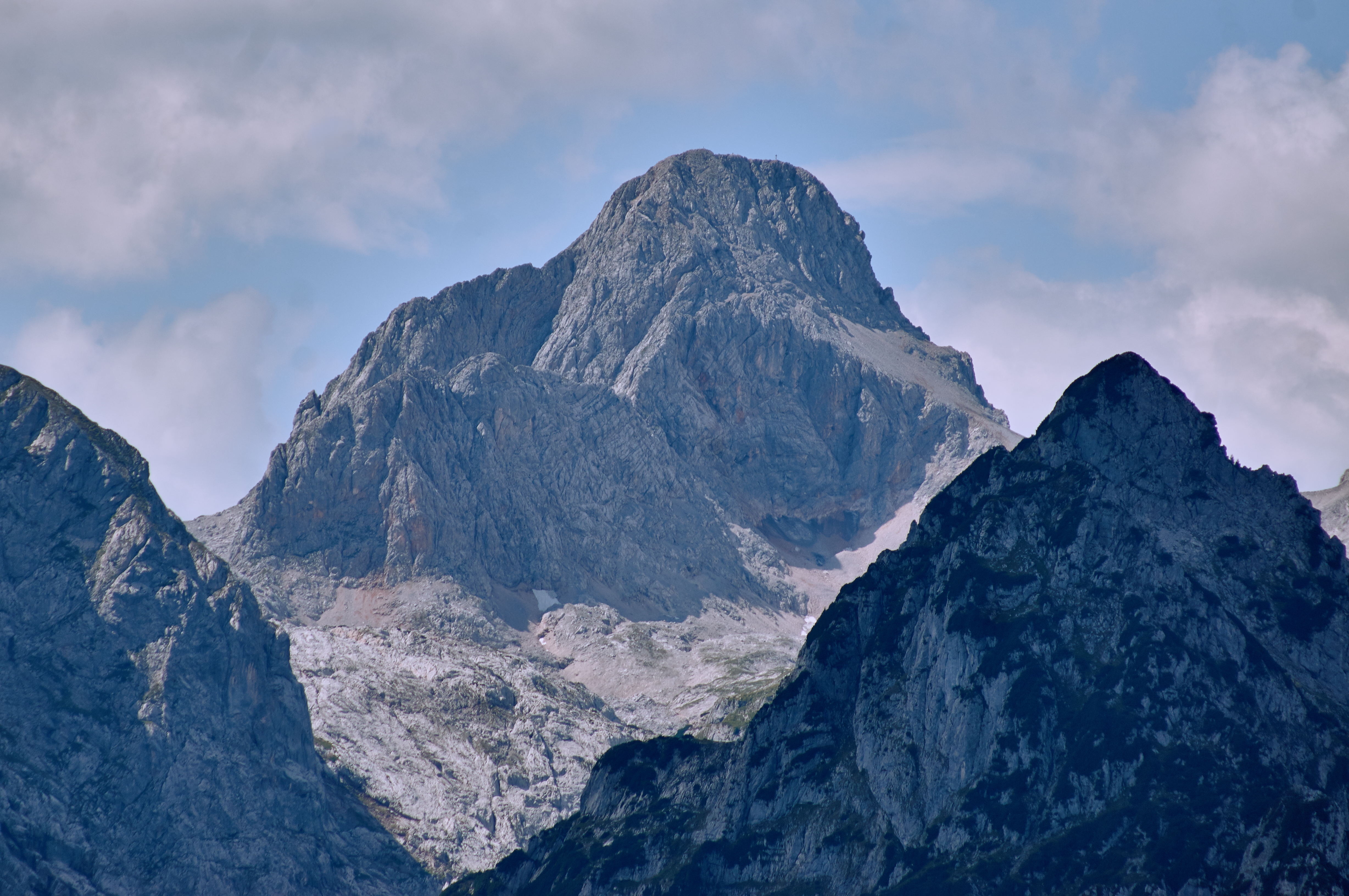 Der Große Hundstod, 2594 m, im Nationalpark Berchtesgaden. This is an image of the Biosphere Reserve or a Geopark: Berchtesgaden Alps Biosphere Reserve